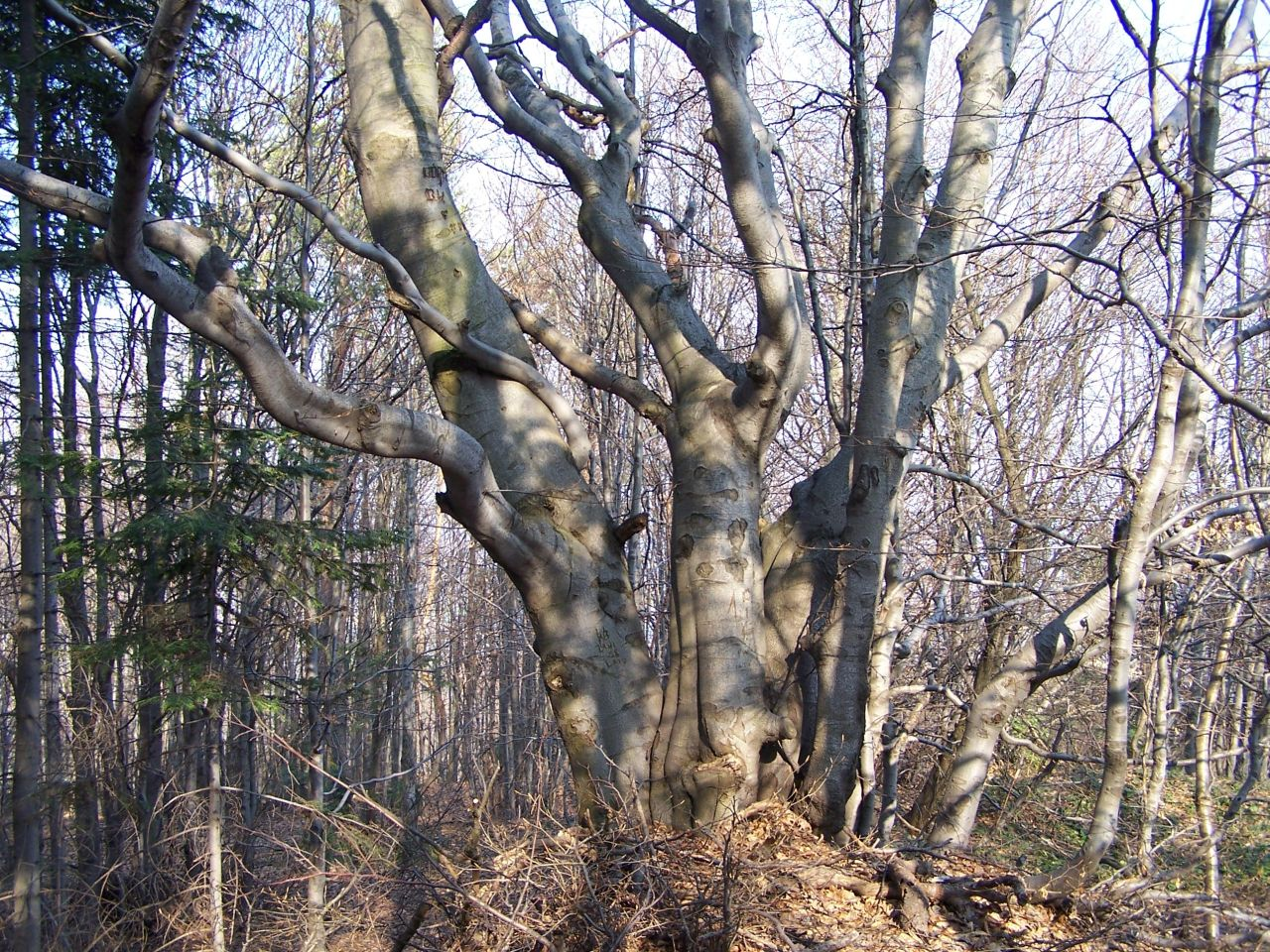 Fagus sylvatica - Dentario-glandulosae - Fagetum (habitat)